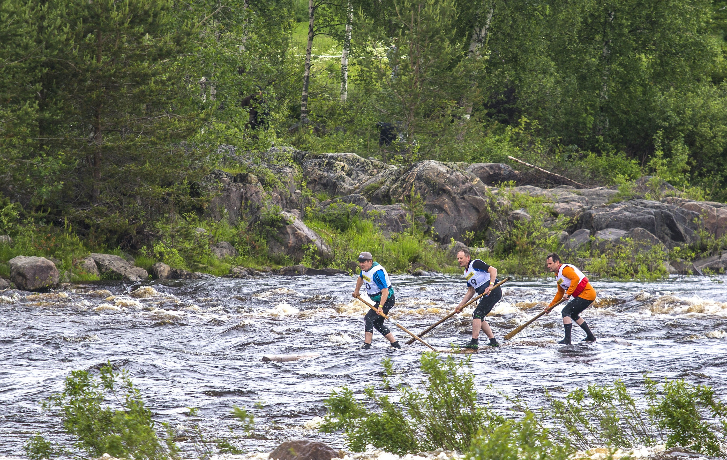 Kuningasjätkä, Tukkilaiskisat Iin Raasakkakoskella 4.7.2015, Koskenlasku